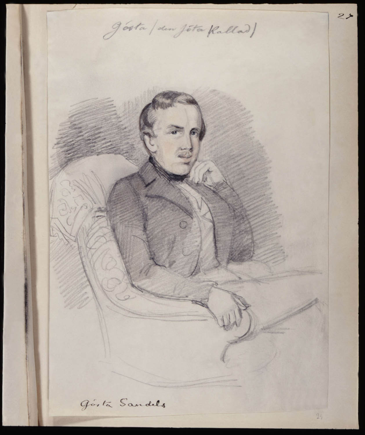 Depicted person: Gösta Sandels [Kan vara sedermera generallöjtnanten, greve Lars Gustaf "Gösta" Sandels (1815-?)]